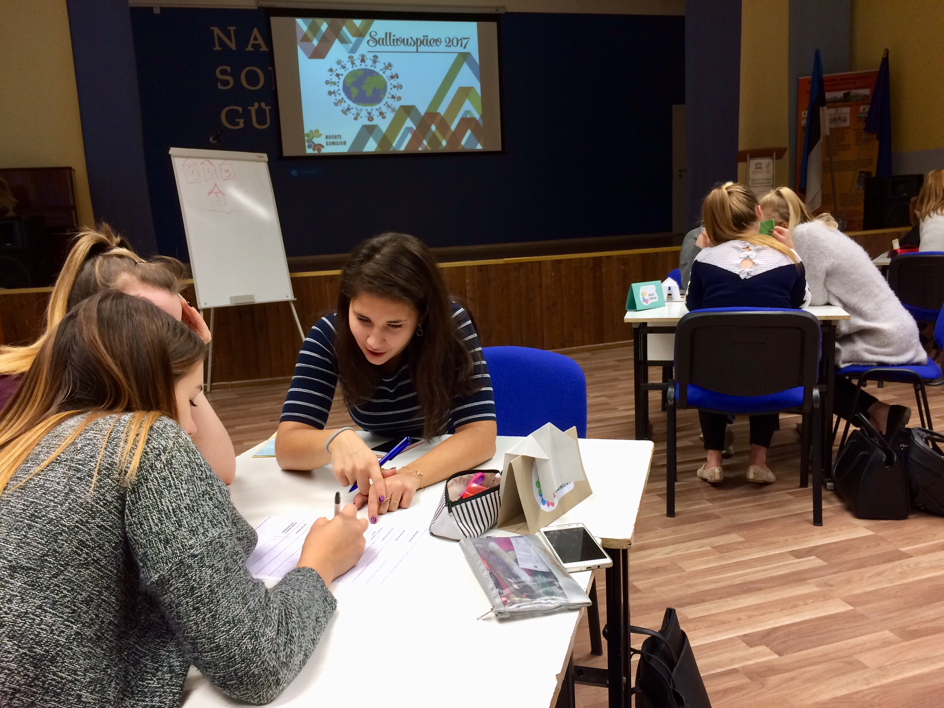 Osalejad mängisid erinevaid mänge ja tegid gruppides ülesandeid, mis panid neid mõtlema stereotüüpide ja eelarvamuste üle.